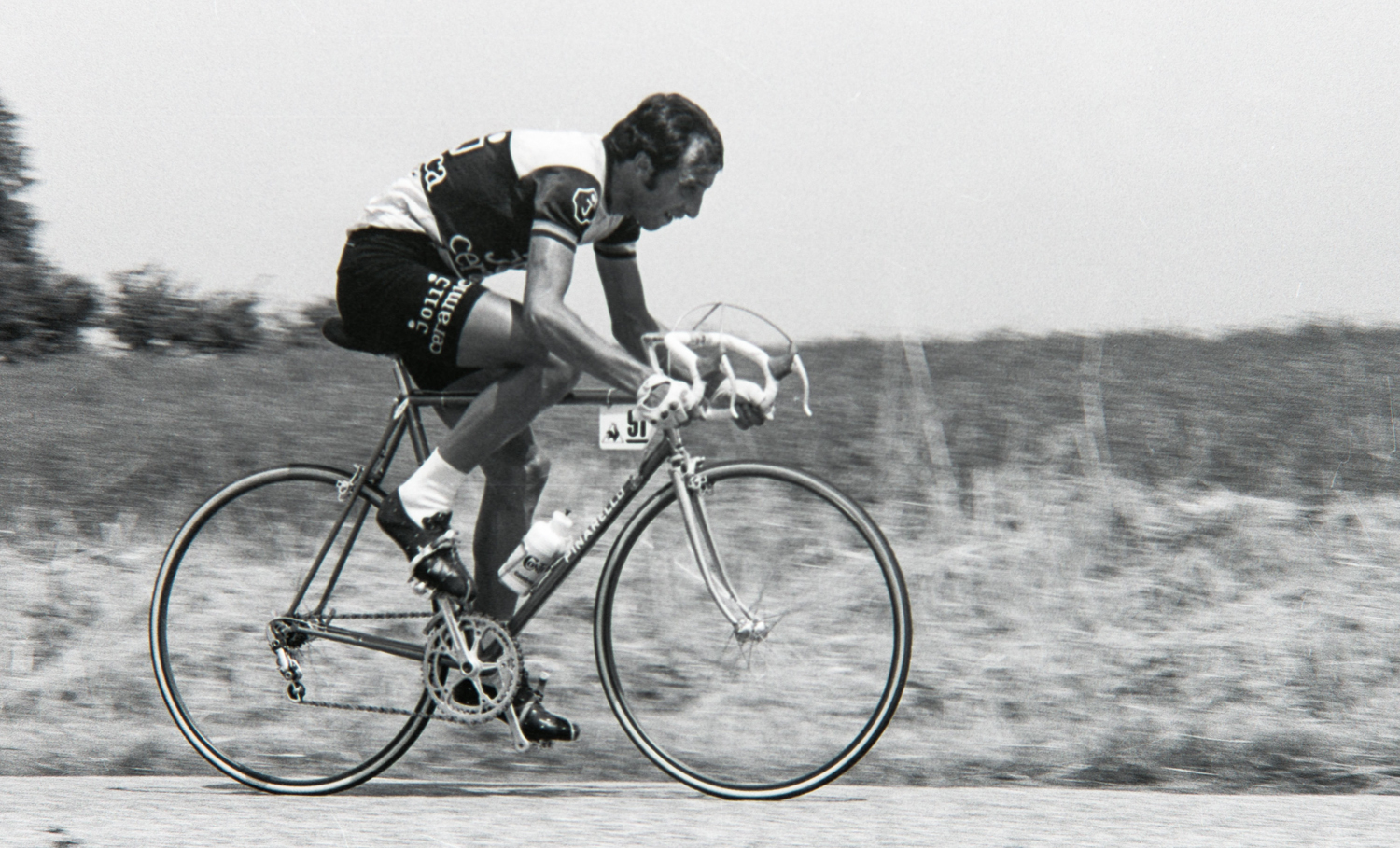 Fausto Bertoglio durant le Tour de France 1976. Photographie : René Milanese